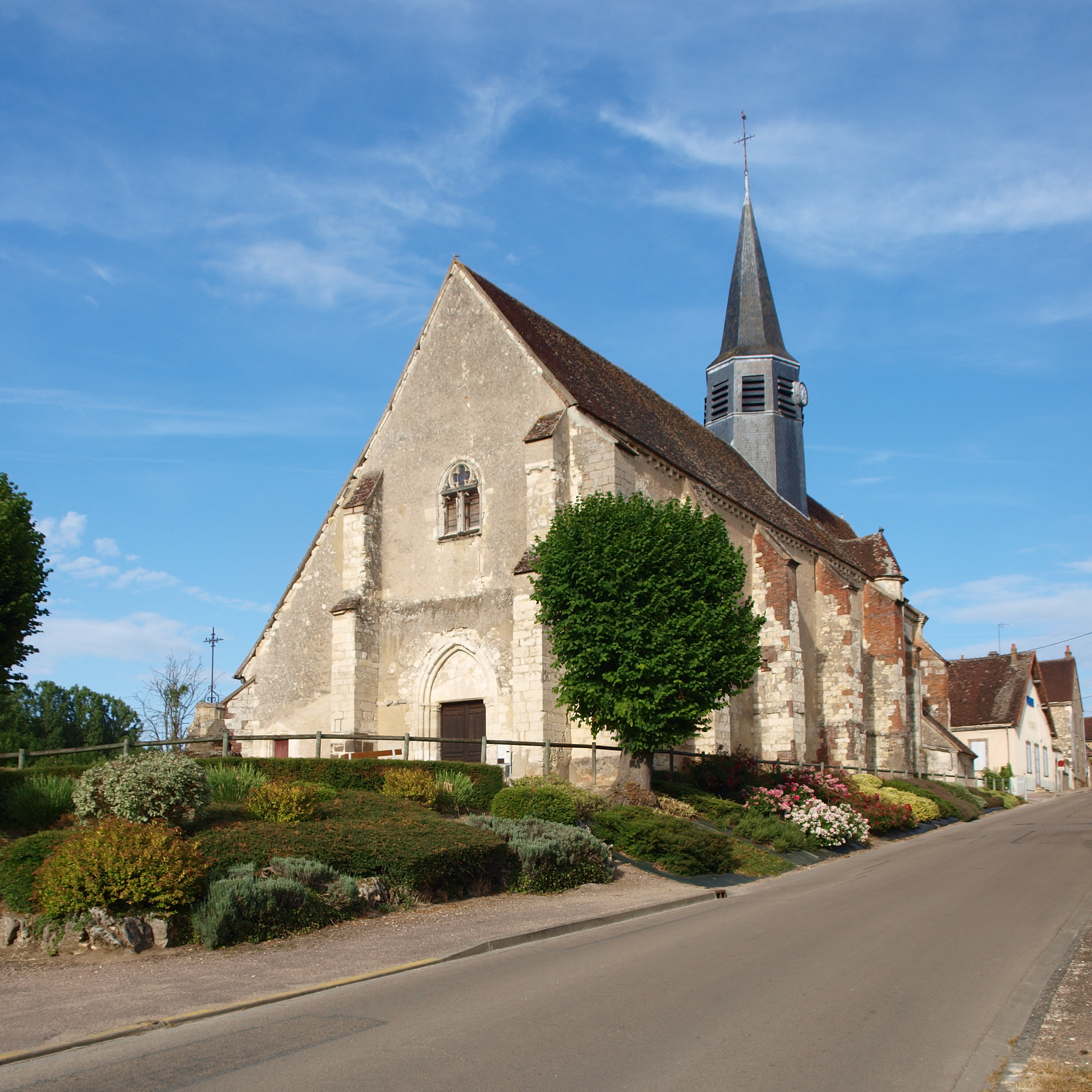 Guerchy (Yonne, France)